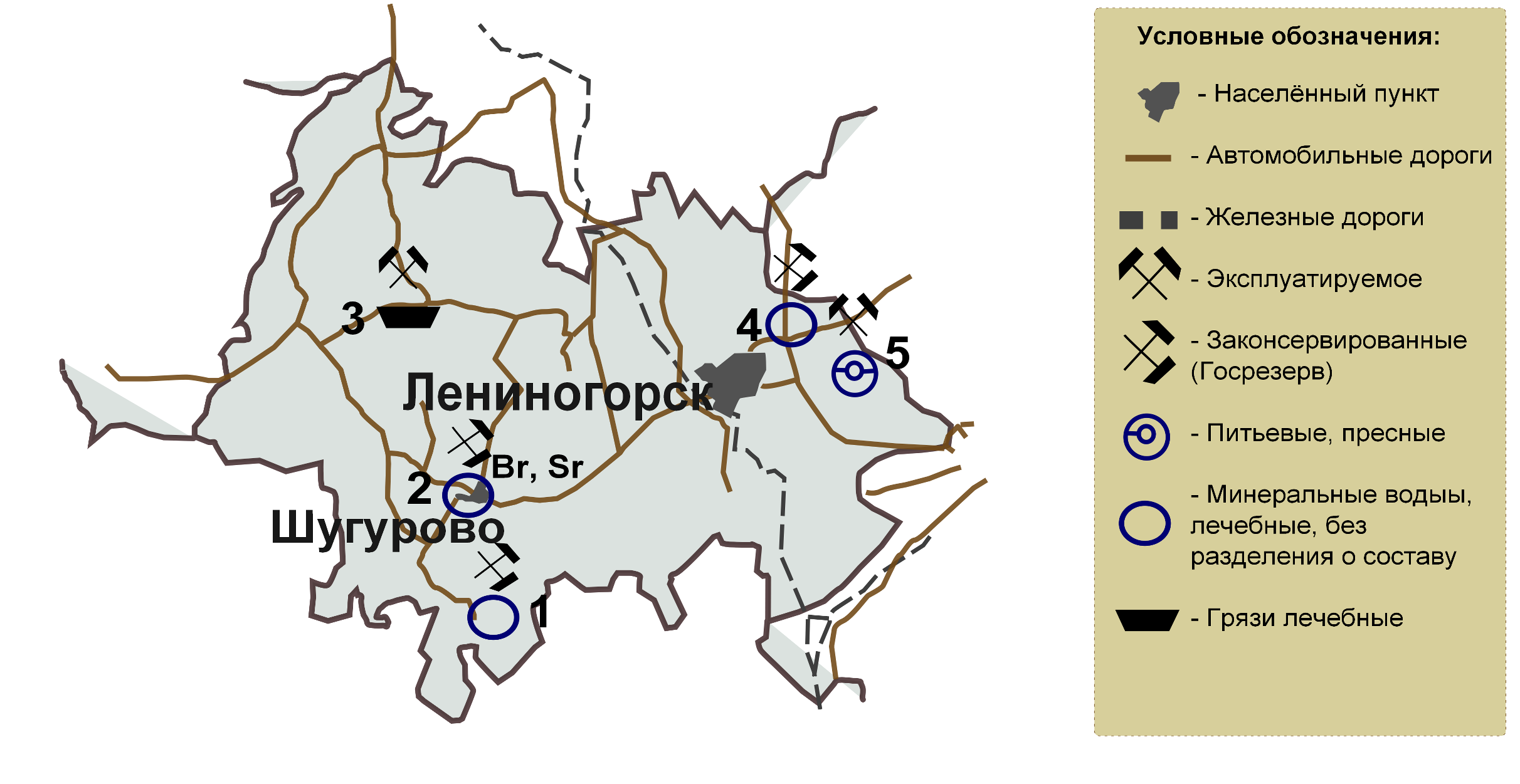 Карта месторождений подземных вод и лечебных грязей на территории Лениногорского муниципально образования в соответствии с данным Росгеолфонда